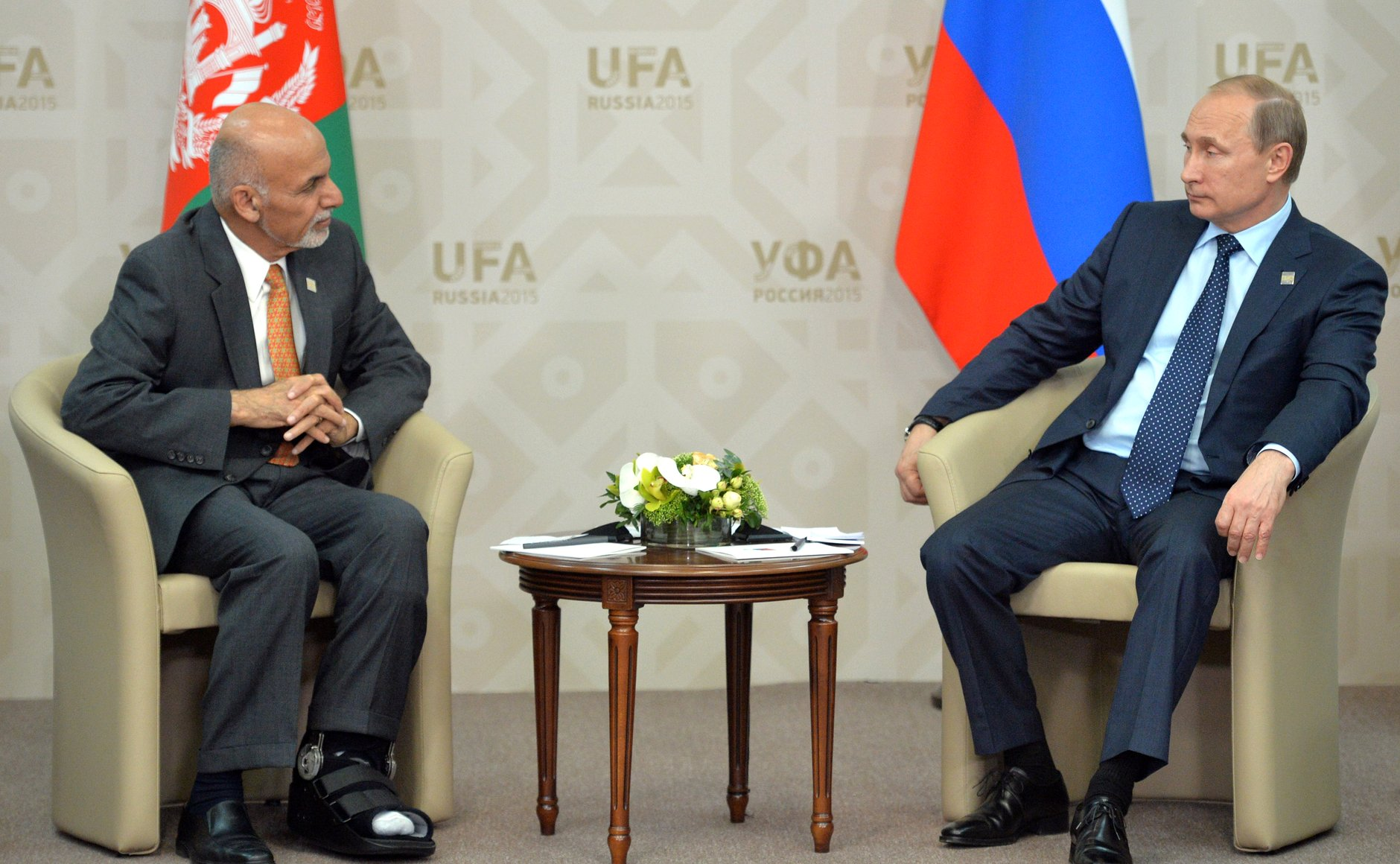 Встреча Президента России Владимира Путина с Президентом Исламской Республики Афганистан Ашрафом Гани